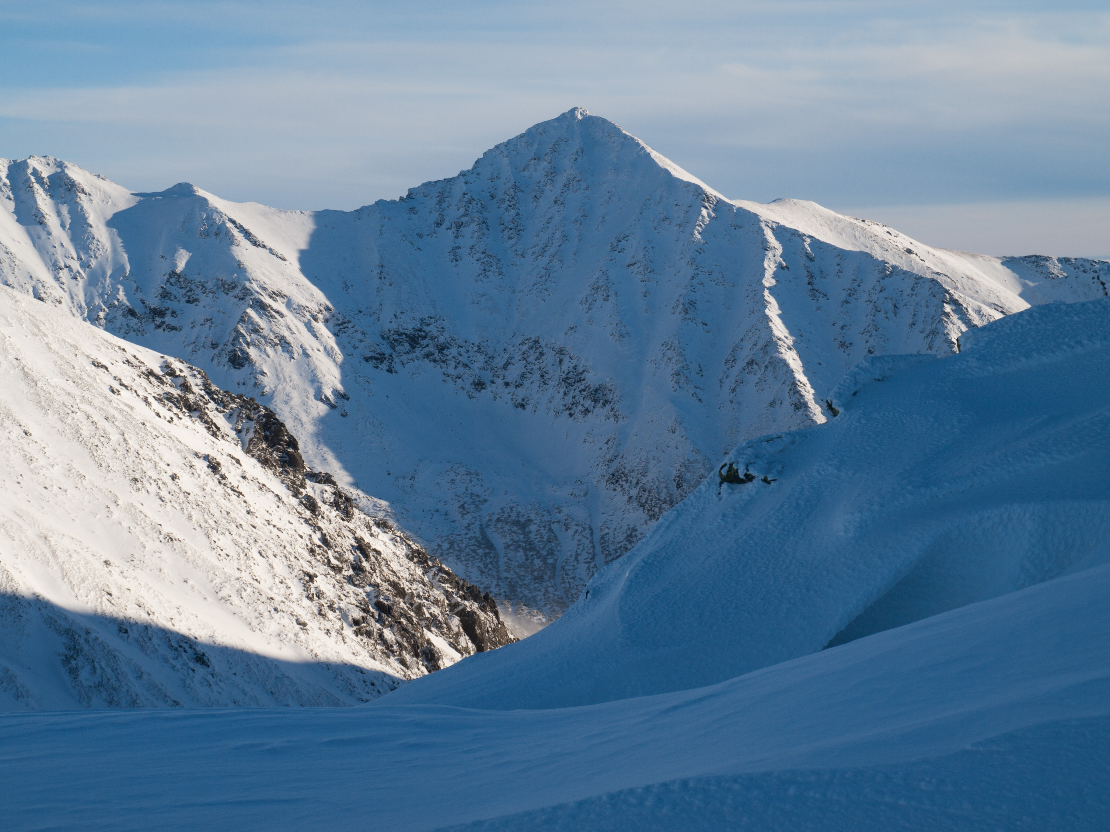 Zadnia Kopa (Niżnia Bystra)